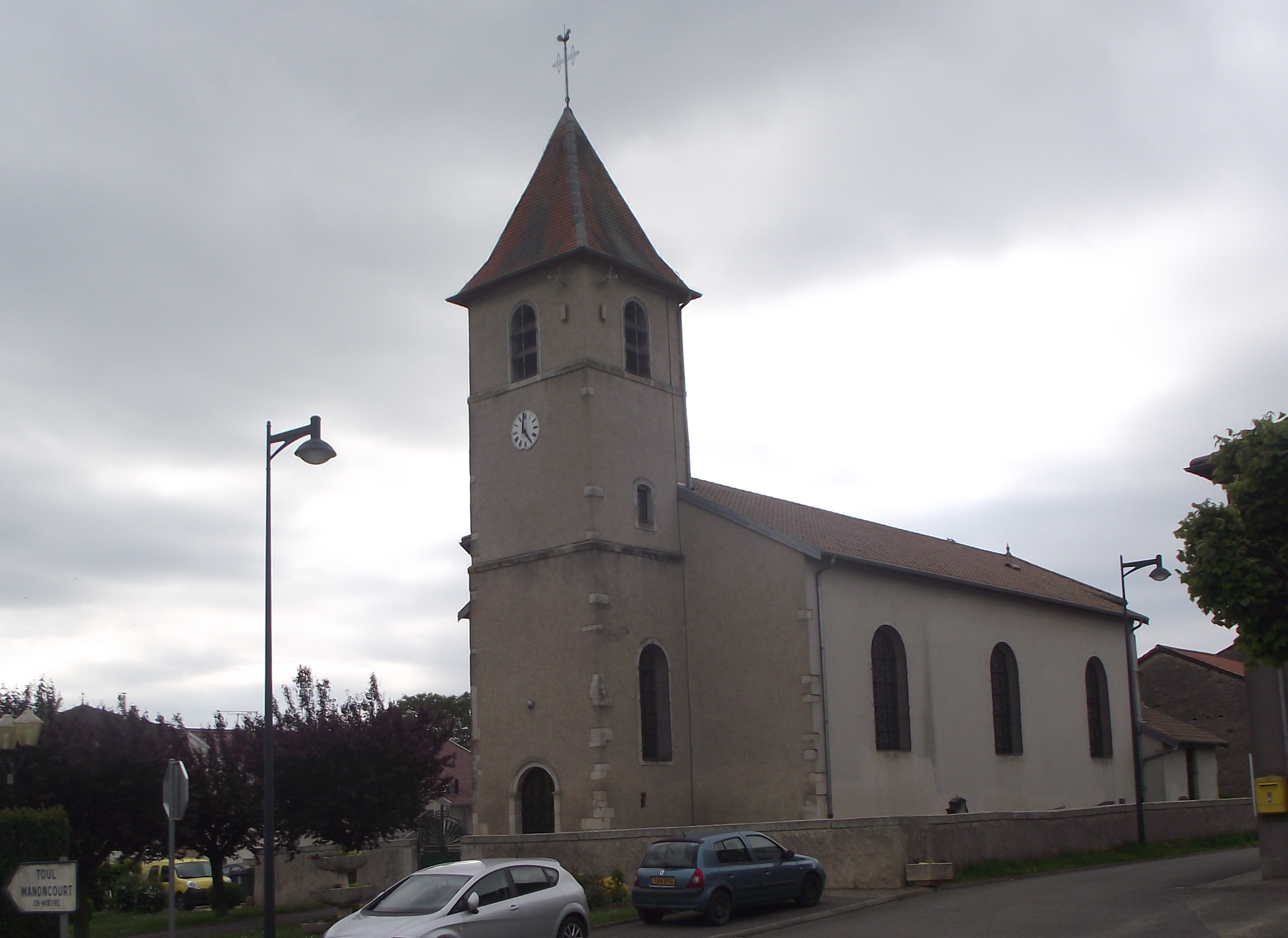 Eglise Saint Pierre